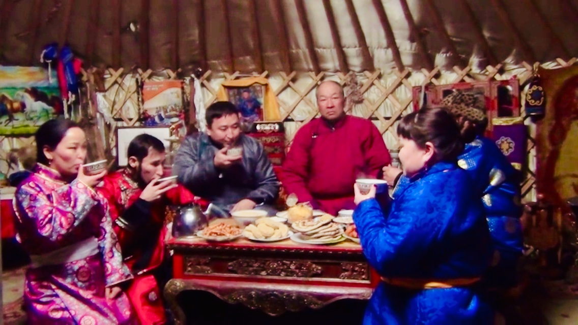 Шагаа. Трапеза